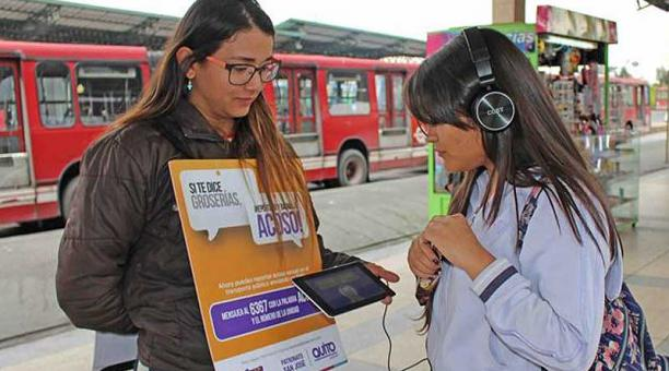 Activación del Programa Bájale al acoso: Activación.